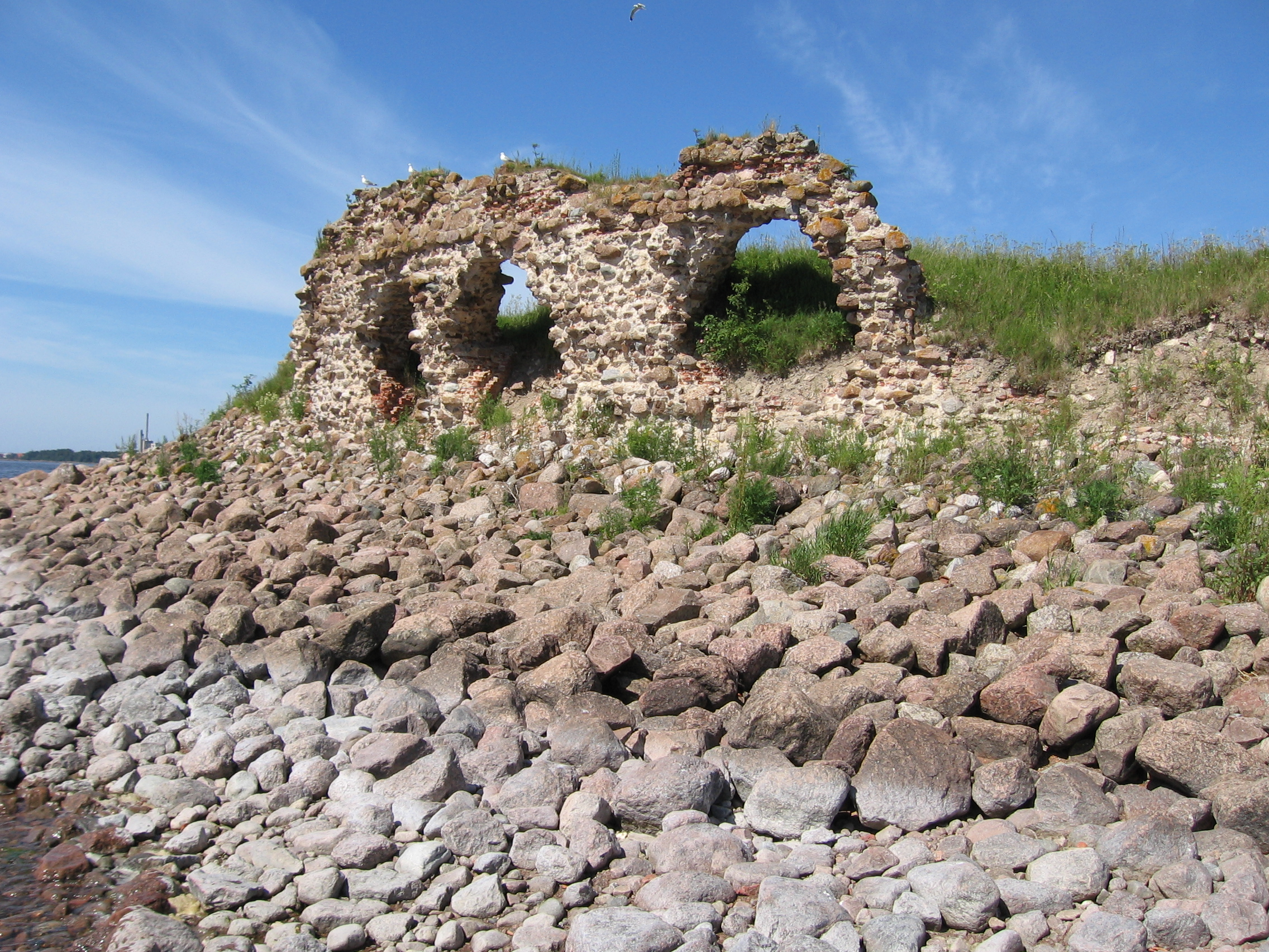 Fort Slavan linnake Kukourin saarella Kotkassa.